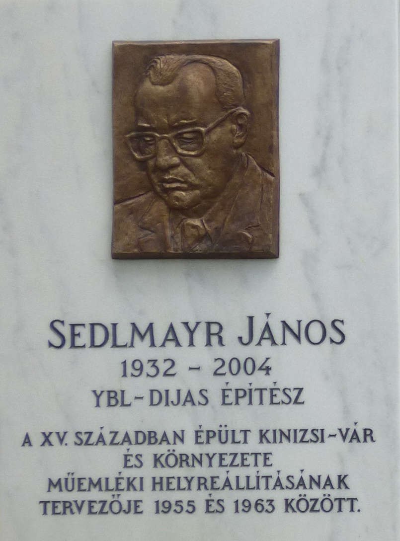 Sedlmayr János emléktáblája (Szőnyi Endre, 2014), a nagyvázsonyi várban